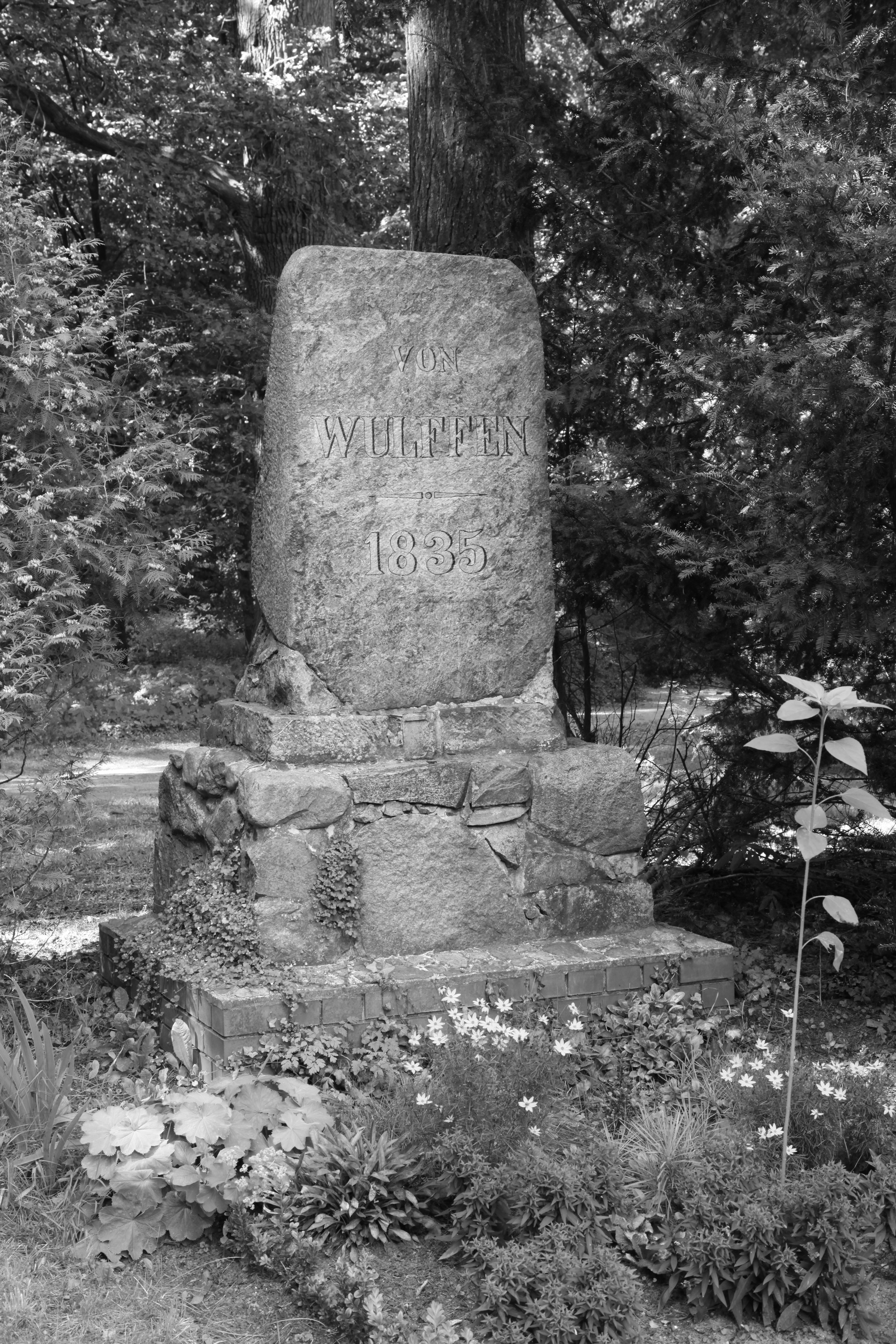 Stadtpark Neuruppin, Gedenkstein für Oberst A. Wulffen Object location52° 56′ 23.63″ N, 12° 49′ 22.06″ E